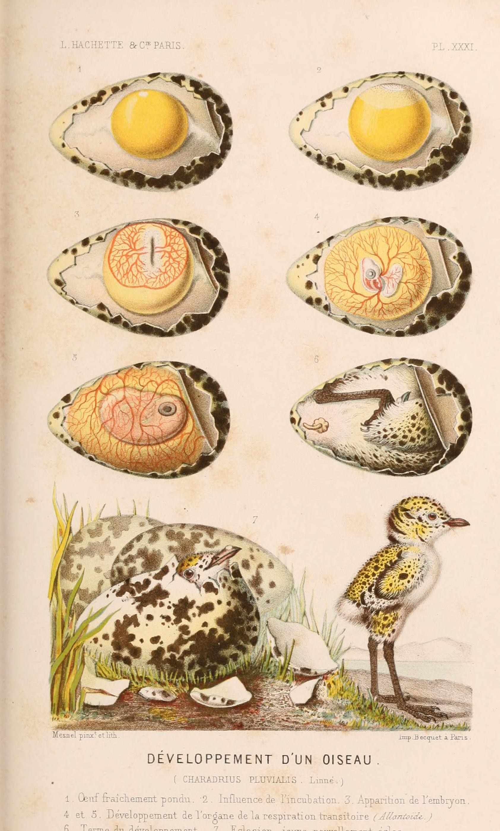 Développement d'un oiseau. CHARADRIUS PLUVIALli 1. Oeuf fraichement pondu. 2. Influence de l'incubation. 3. Apparition de l'embryon. 4 et 5. Développement de l'organe de la respiration transitoire (Allantoïde). 6. Terme du développement. 7. Éclosion du jeune.